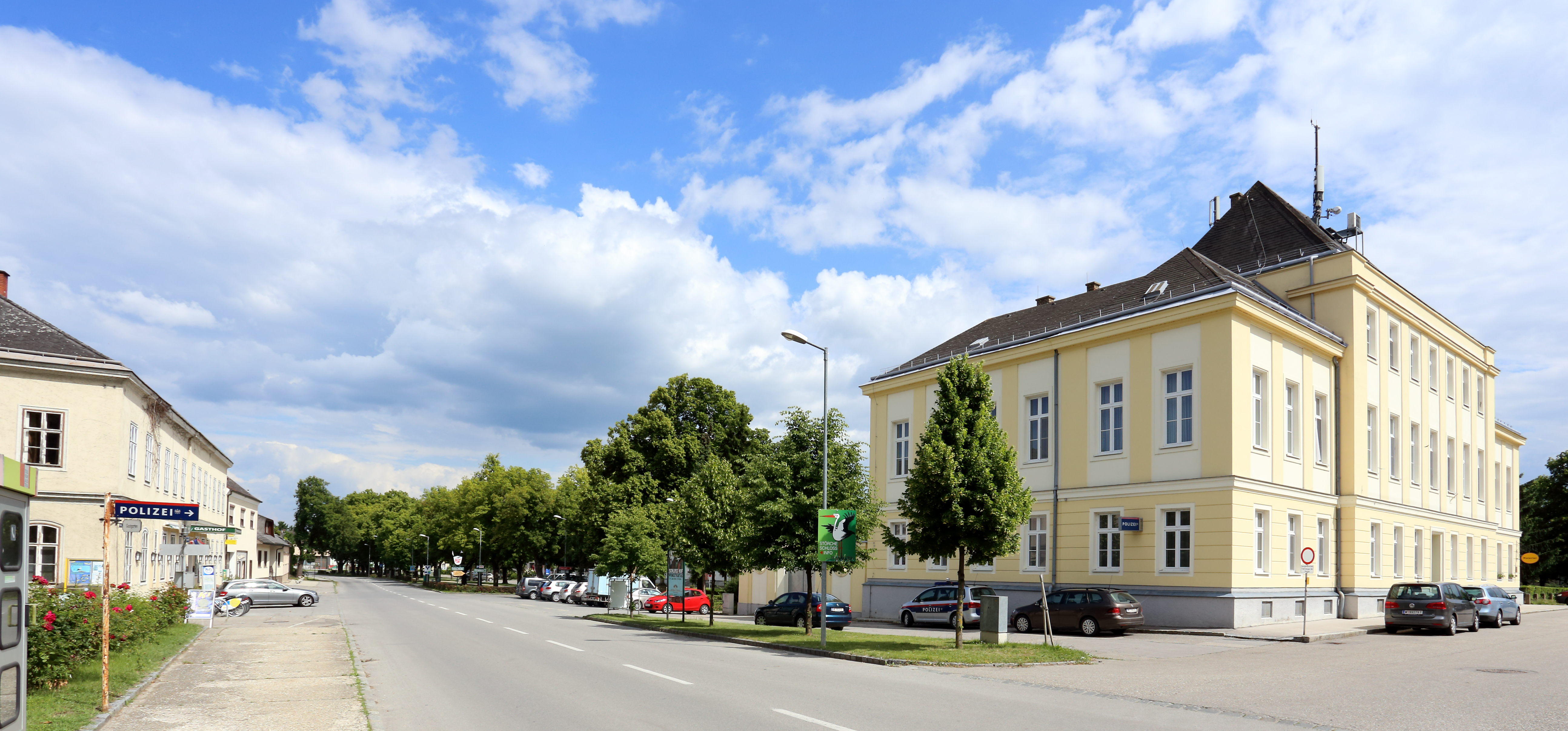 Hauptplatz der niederösterreichischen Stadt Marchegg mit dem von 1907 bis 1910 errichteten Amtshaus (rechts).